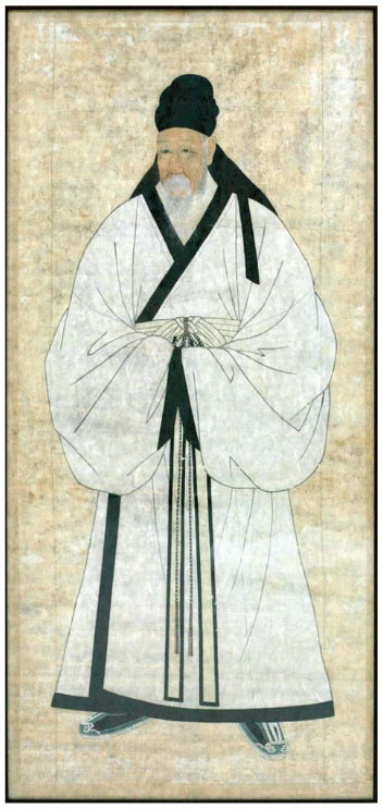 조선후기의 문신 김만증